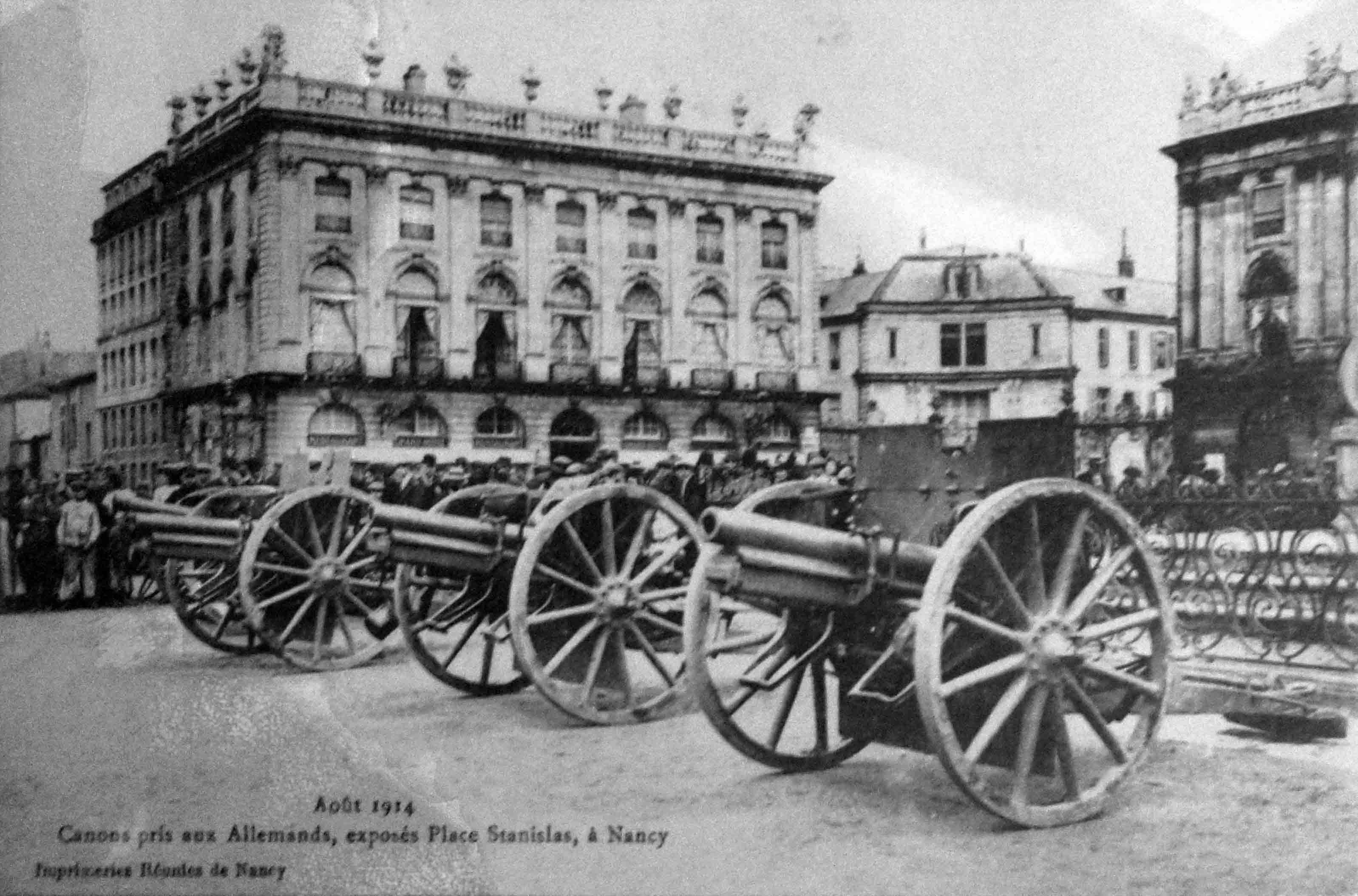 Présenté lors de Été 1914 Nancy et la Lorraine dans la guerre exposition. 7 canons ont été neutralisés à Erbéviller le 25 août par les tirs de la 3e batterie du 33e RAC (voir l'historique du 33e RAC